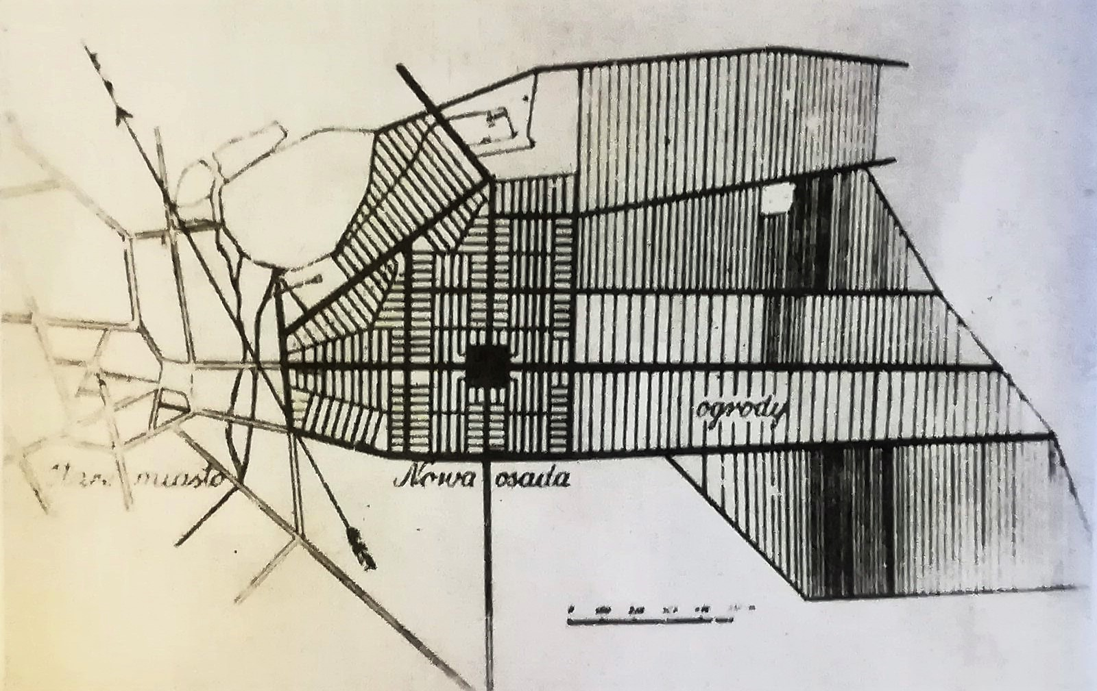 Plan Zgierza z 1821r.